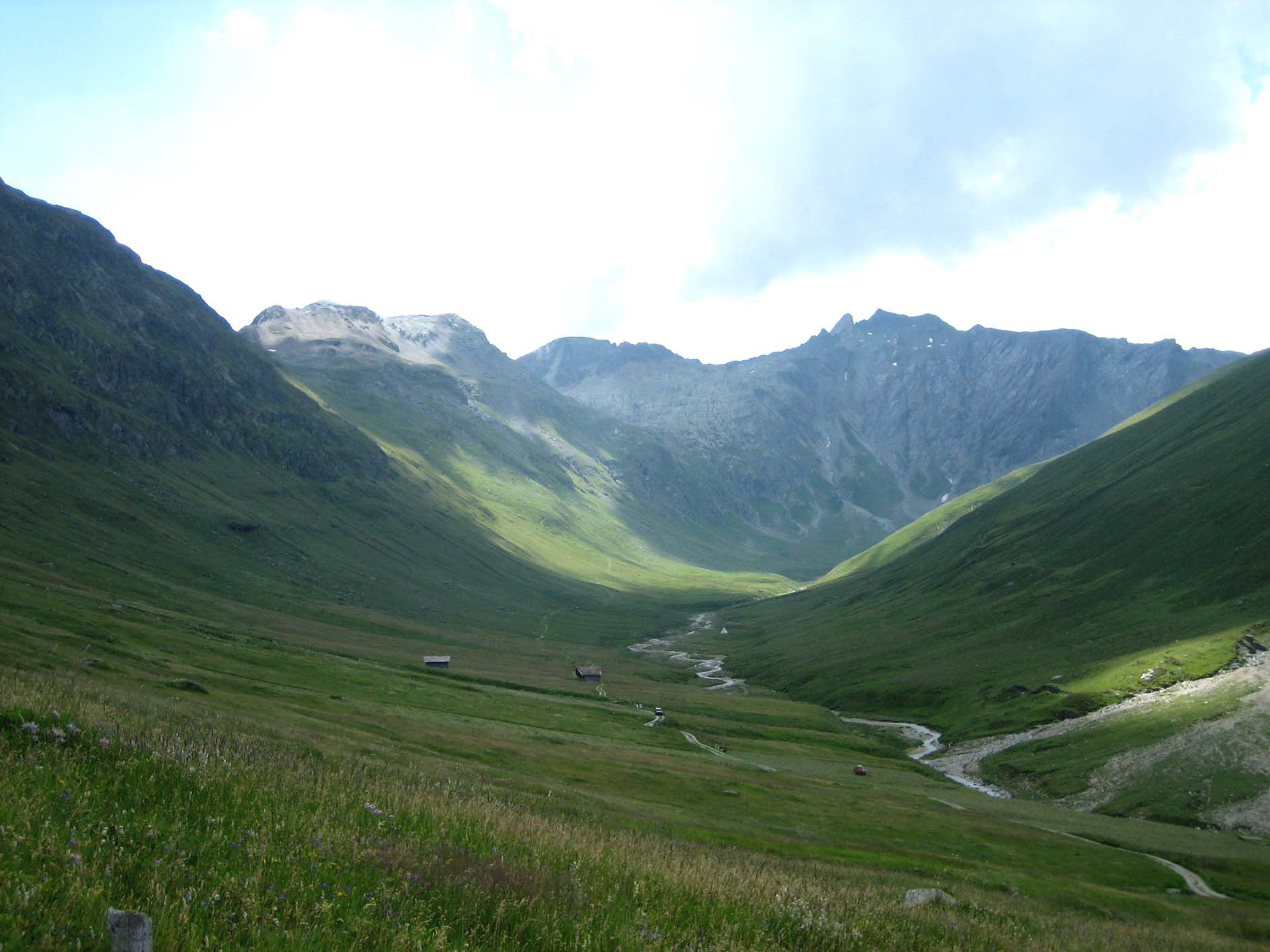 Trogtal bei Juf GR